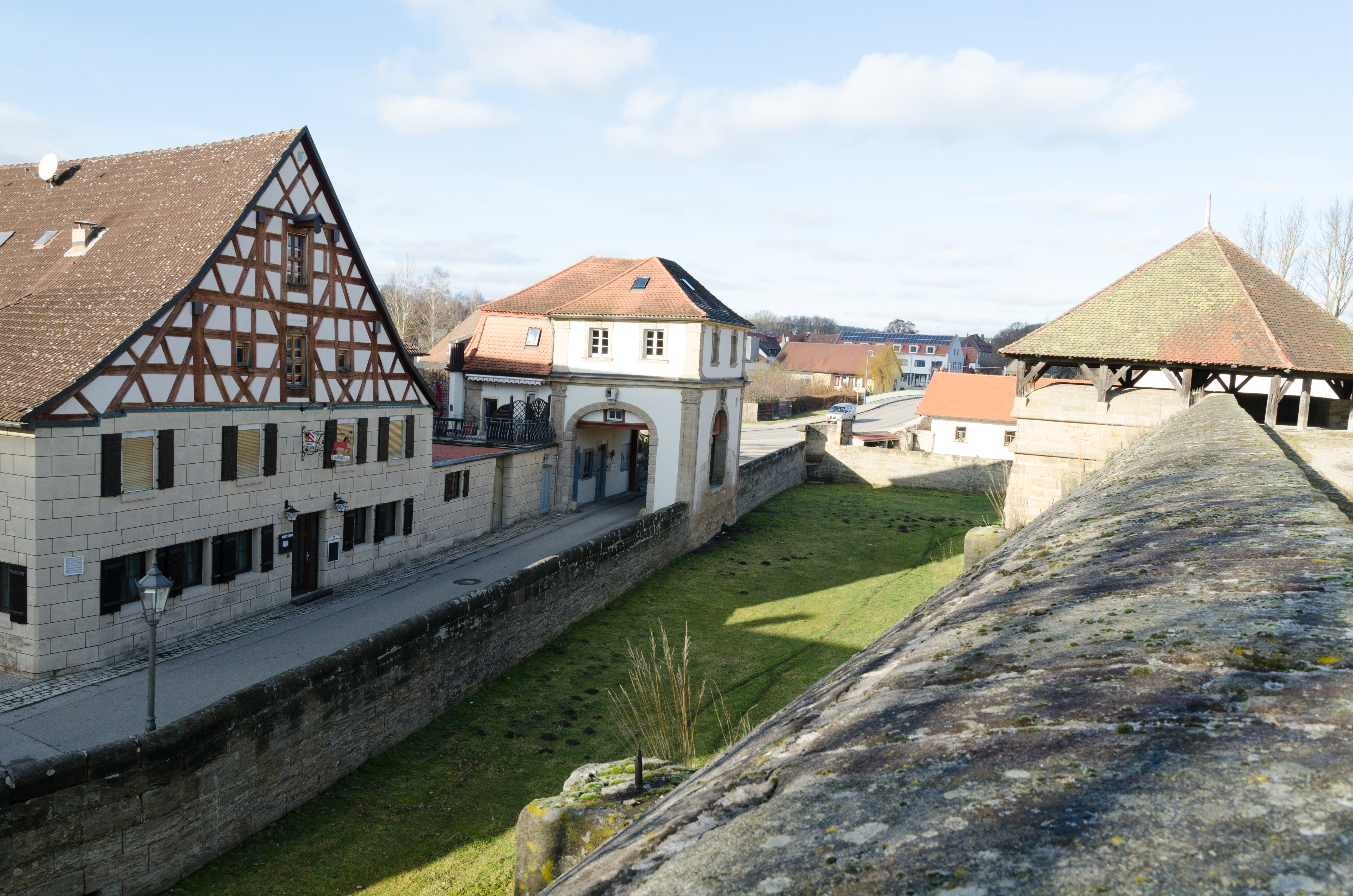 Lichtenau, Von-Heydeck-Straße 4, 2